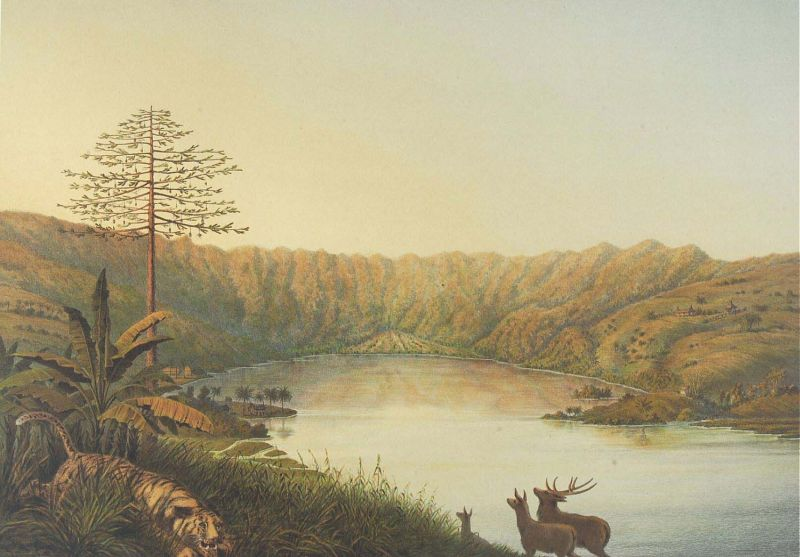 Litho. Litho naar een oorspronkelijke tekening van F.C. Wilsen. Pagina 4 van de map "De Indische Archipel", Den Haag, 1865-1876, met daarin 24 kleurenlitho's, van objectnr. 3728-430 t/m 3728-479.. Het meer van Maninju Danau met een tijger en herten op de voorgrond